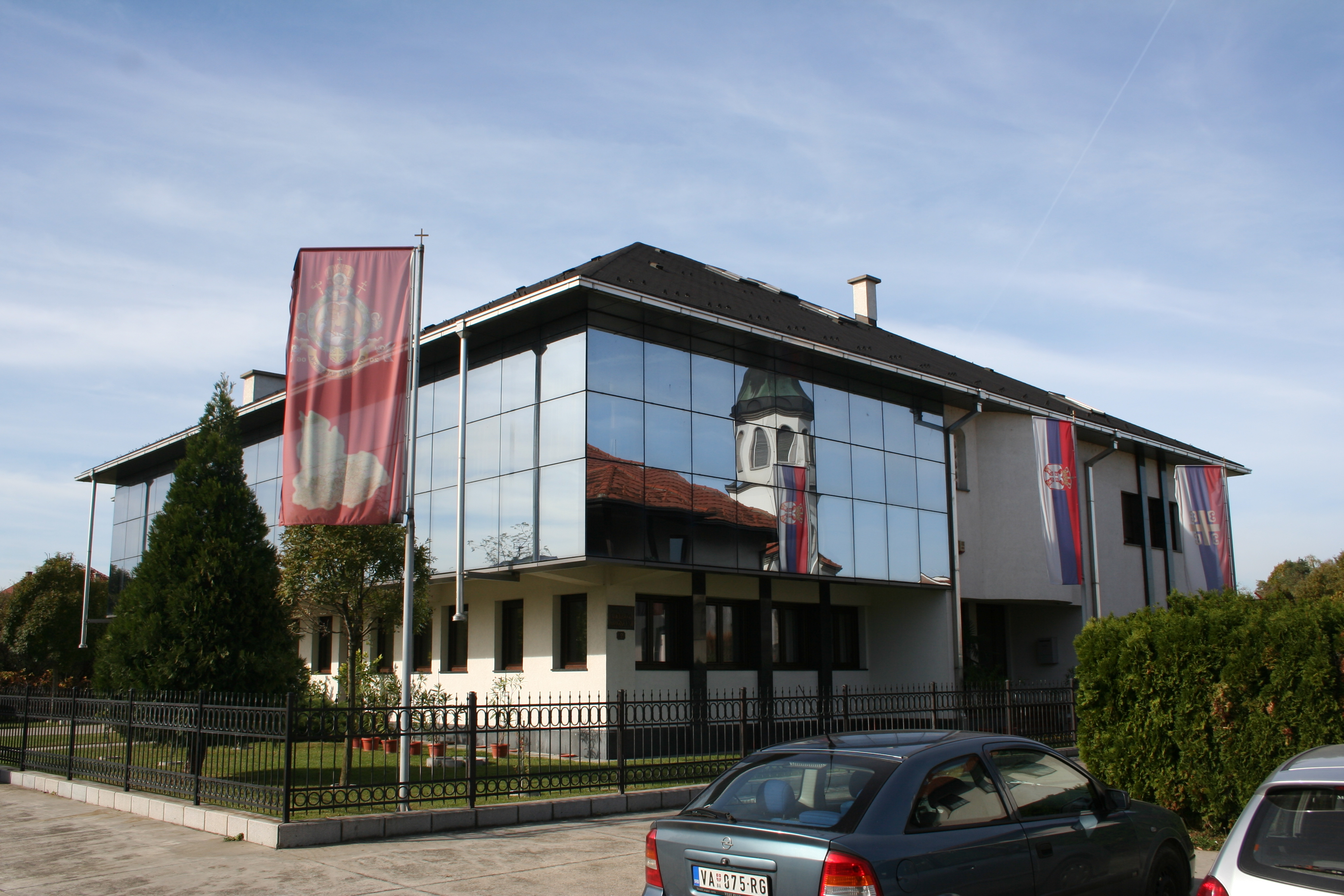 Crkva Sv Georgija i eparhijski dom Valjevo